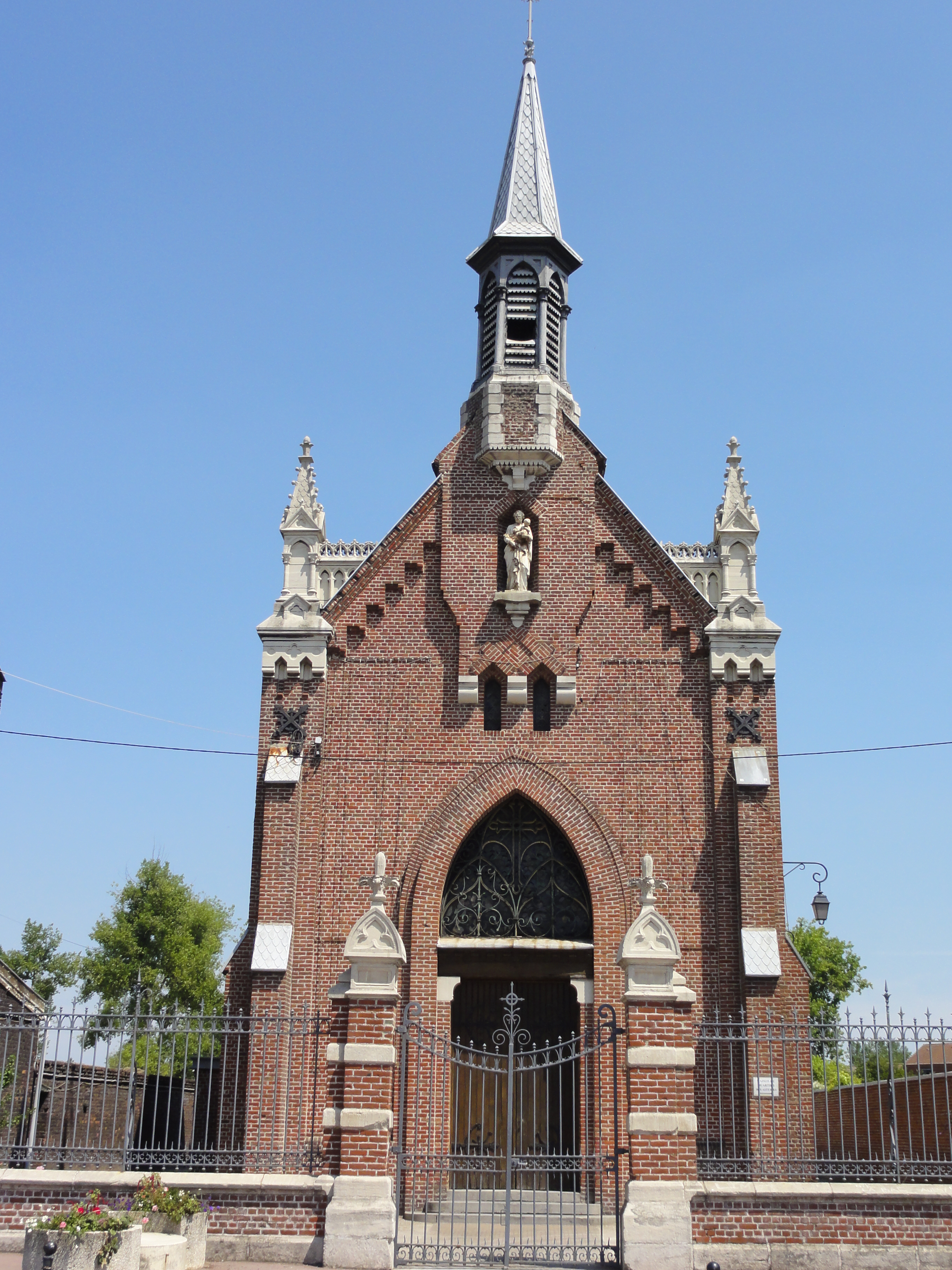 Église Saint-Joseph, Auby, Nord, Nord-Pas-de-Calais, France.